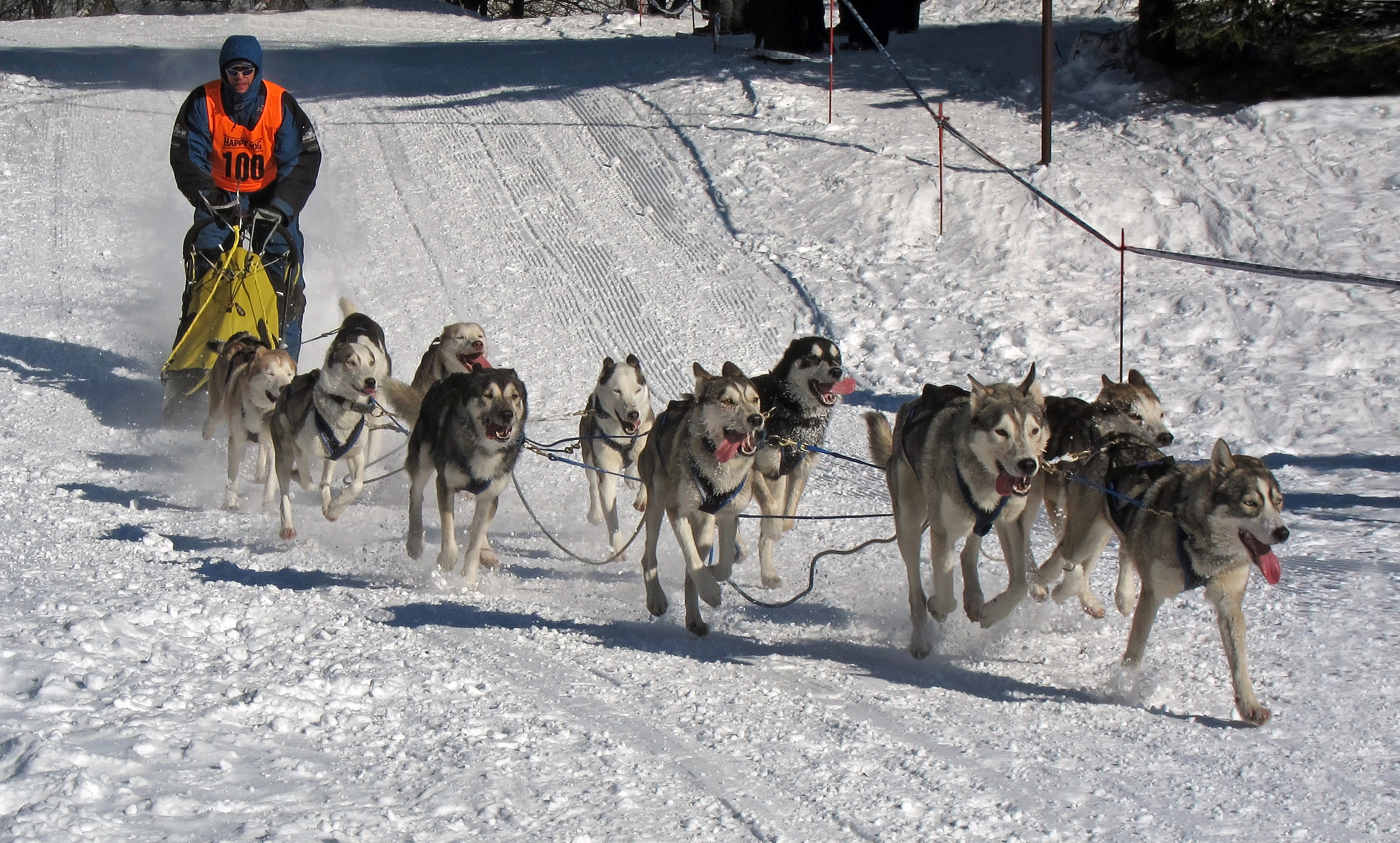 Musher mit elf Siberian Huskys beim Schlittenhunderennen zur Deutschen Meisterschaft 2012 in Frauenwald.